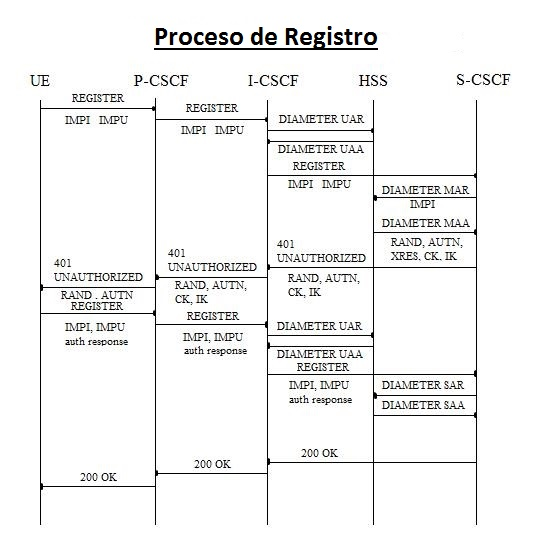 registro ims